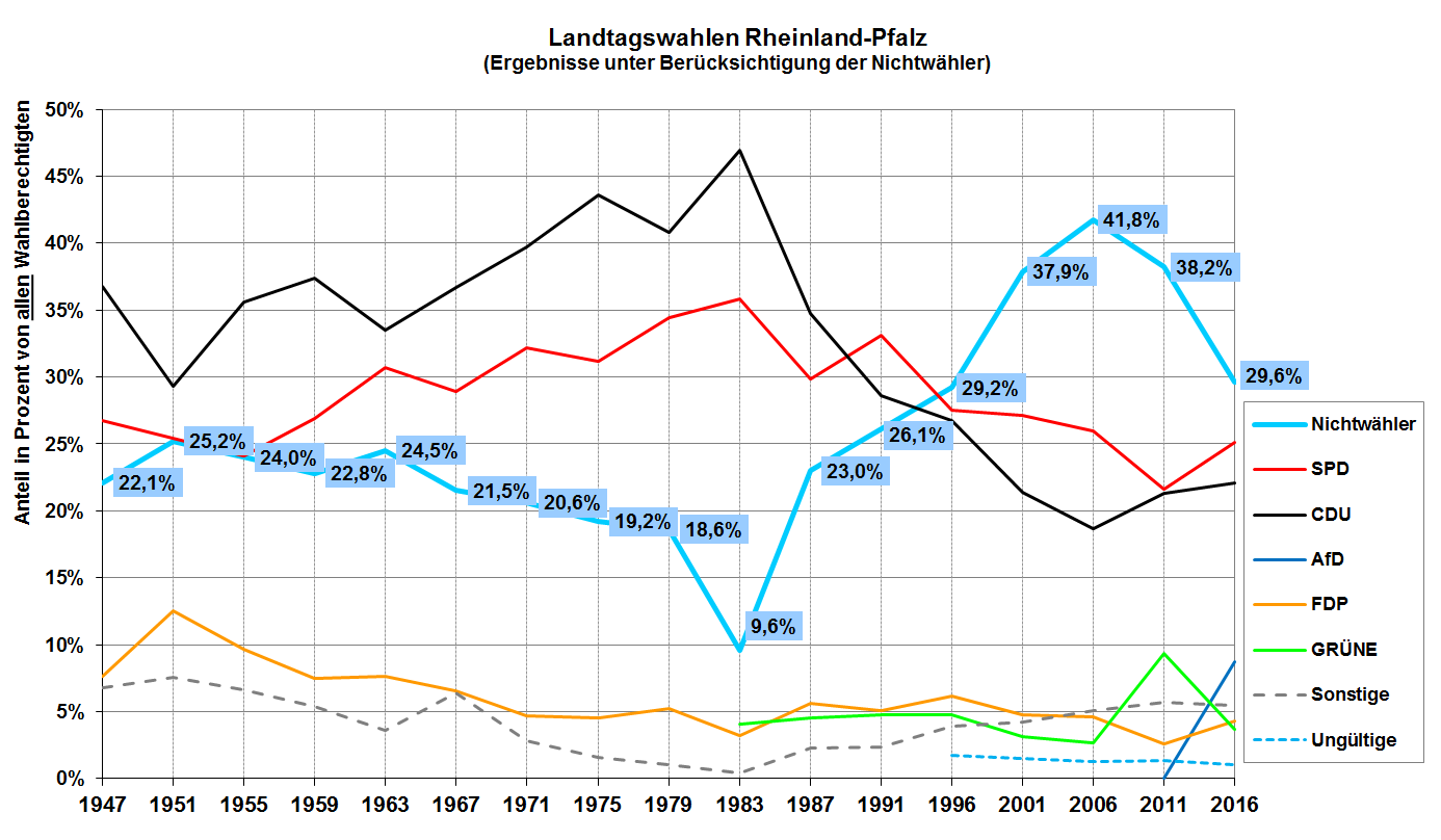 Historie des Anteils der Nichtwähler bei den Landtagswahlen in Rheinland-Pfalz